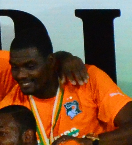 Sylvain Gbohouo celebrando con Costa de Marfil la obtención de la Copa Africana de Naciones 2015.